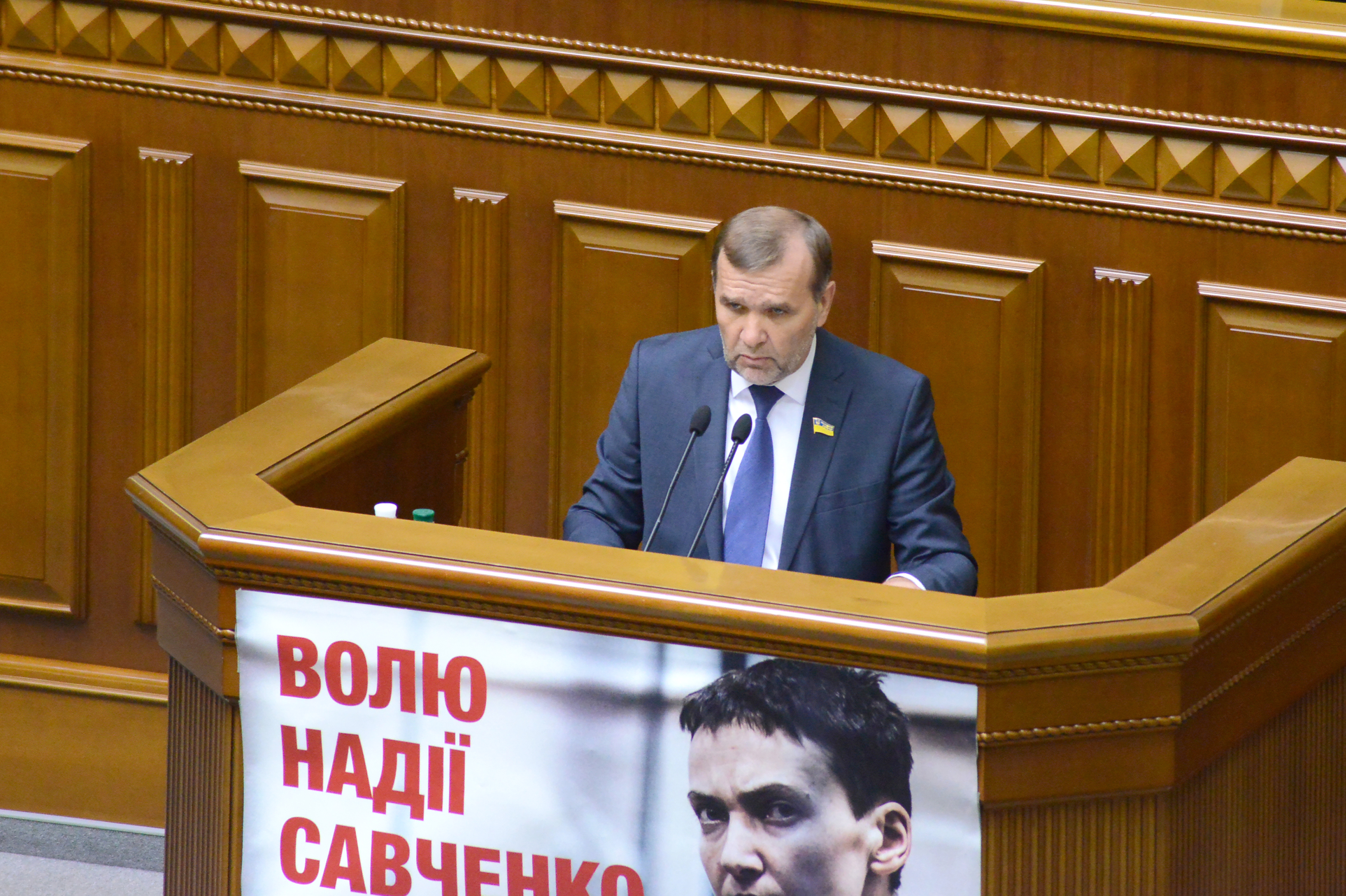 ВЕРХОВНА РАДА УКРАЇНИ 2015 фотограф Вадим Чуприна